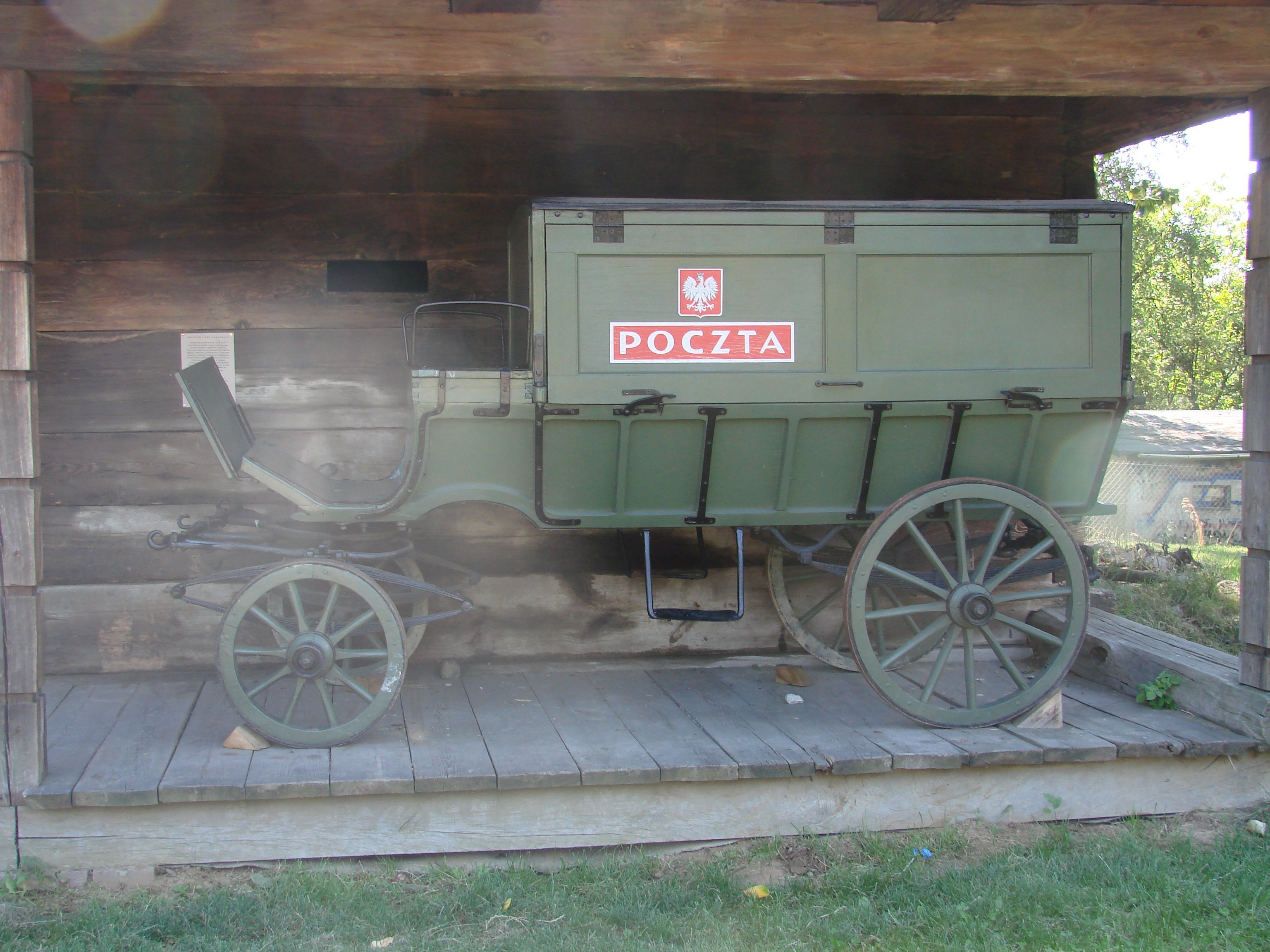 Wóz do przewożenia przesyłek pocztowych odziedziczony przez Pocztę Polską po zaborcy. Skansen Lubelski na Sławinku